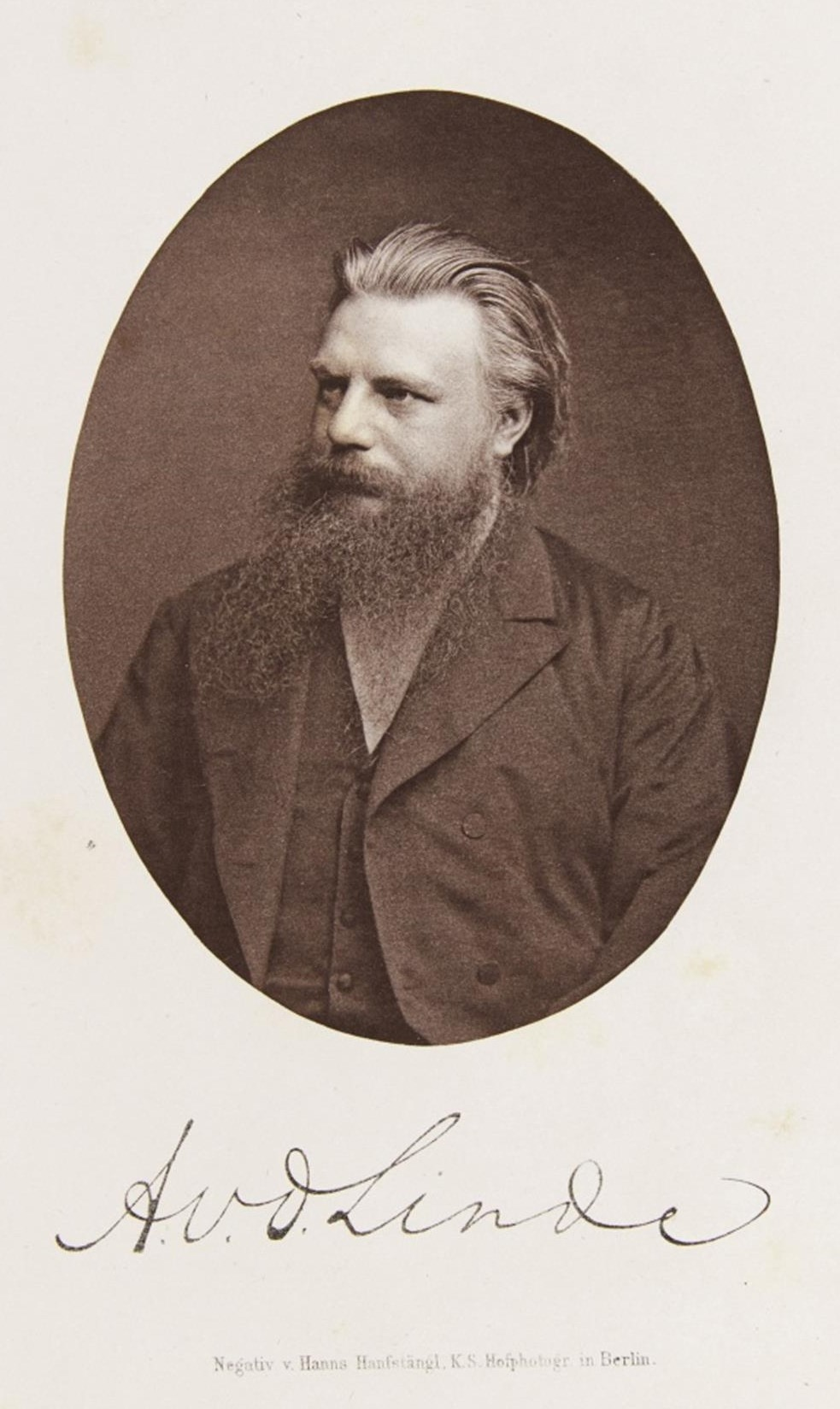 Antonius van der Linde , 1874